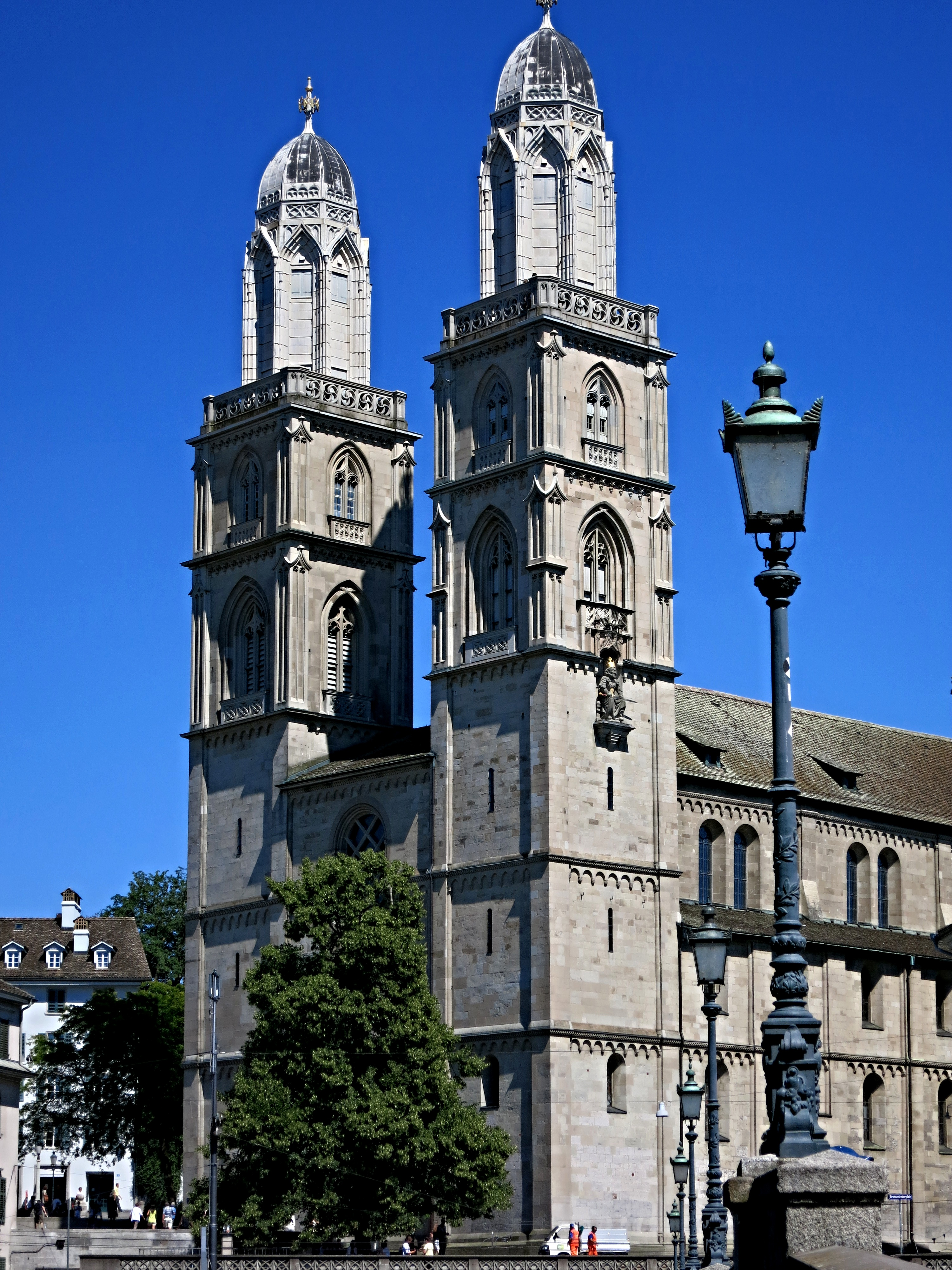 Grossmünster, Rechts ist der Karlsturm